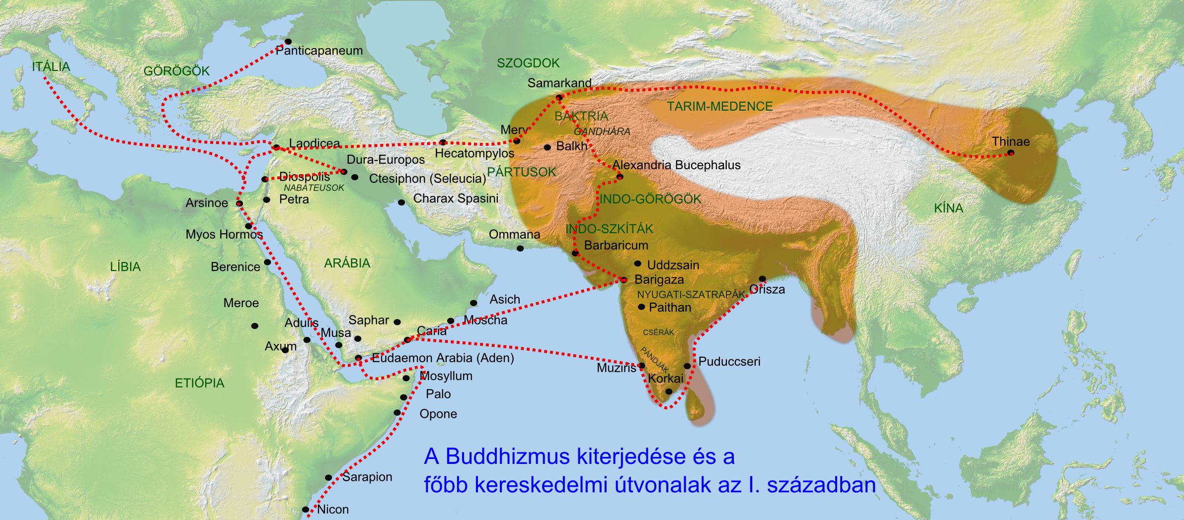 Buddhista kereskedelmi kapcsolatok az I. században